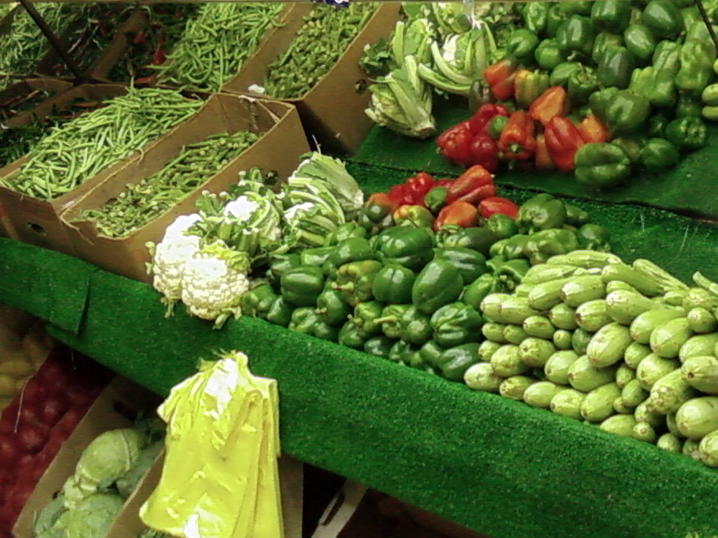 കടയിൽ പച്ചക്കറികൾ വില്പനയ്ക്ക് വെച്ചിരിക്കുന്നു. ജിദ്ദയിലെ സുലൈമാനിയയിലെ ഒരു പച്ചക്കറിക്കടയിലെ ദൃശ്യം (Bluemangoa2z-ന്റെ അഭ്യർഥന പ്രകാരം അപ്‌ലോഡ് ചെയ്തത്.)